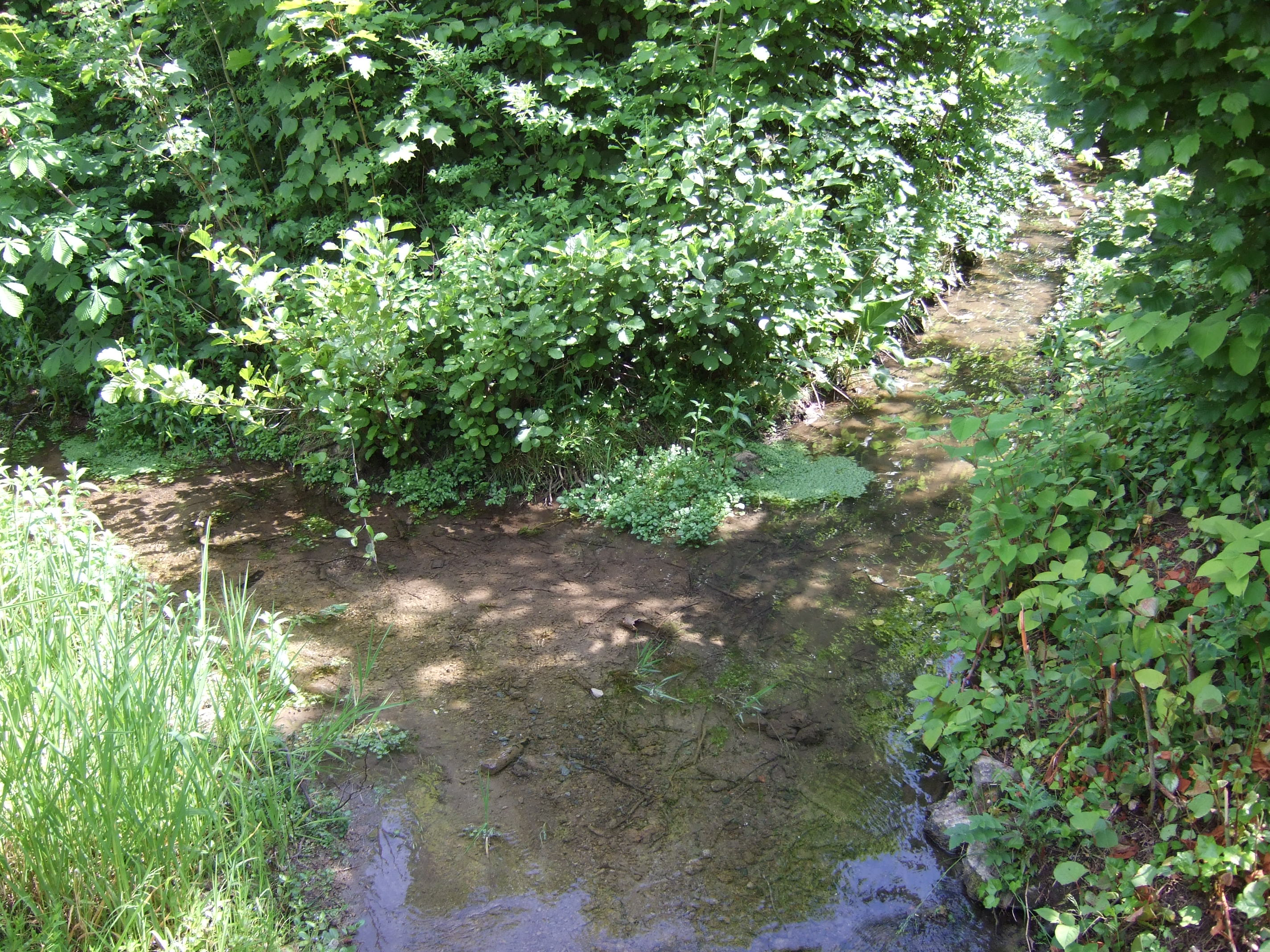 Ursprung der Trebgast in Bindlach